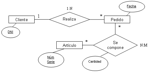 Ejemplo de diagrama E-R extendido.PNG (section)